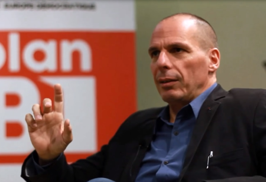 Yanis Varoufakis en una entrevista a El Desperttador el 20 de febrero de 2016 en Madrid.